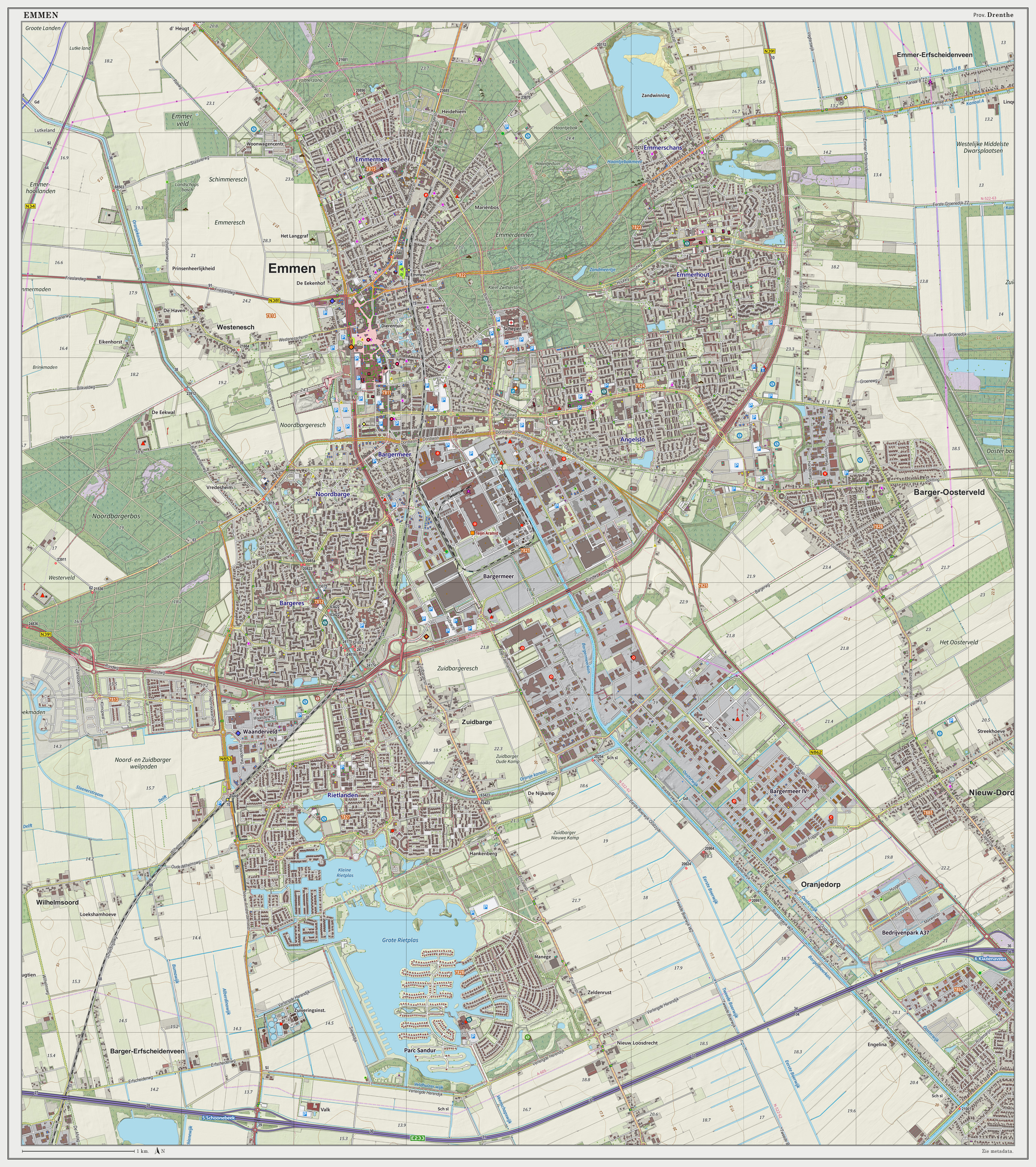 Topografische kaart van Emmen (woonplaats). Resolutie: 300 pixels/km. Kaartbeeld samengesteld uit de open geodata van de Top10NL en Top25namen (Basisregistratie Topografie, Kadaster), Creative Commons BY licentie. Gebouwvlakken uit open geodata BAG extract. Wegen uit de OpenStreetMap, OpenStreetMap community. Schaduwreliëf uit de Actuele Hoogtekaart AHN2. Samenstelling en kleurenschema: Jan-Willem van Aalst, met QGIS2. Zie ook de Legenda.